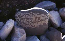 Manistein mit dem Mantra Om ma tri mu ye sa le du.